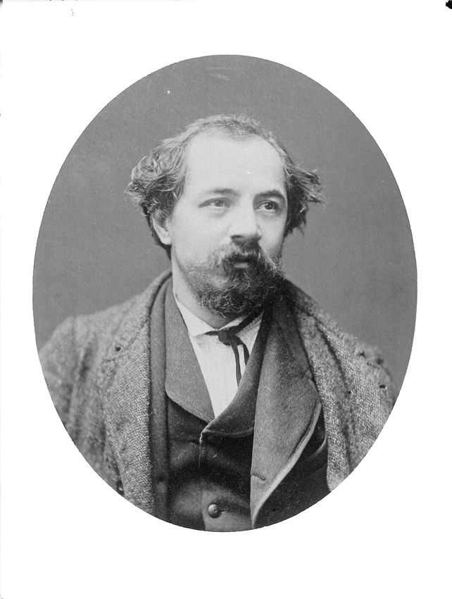 Ritratto del pittore Tranquillo Cremona rifotografato da Emilio Sommariva emodificato in origine